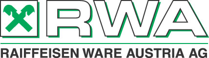 LogoRWA